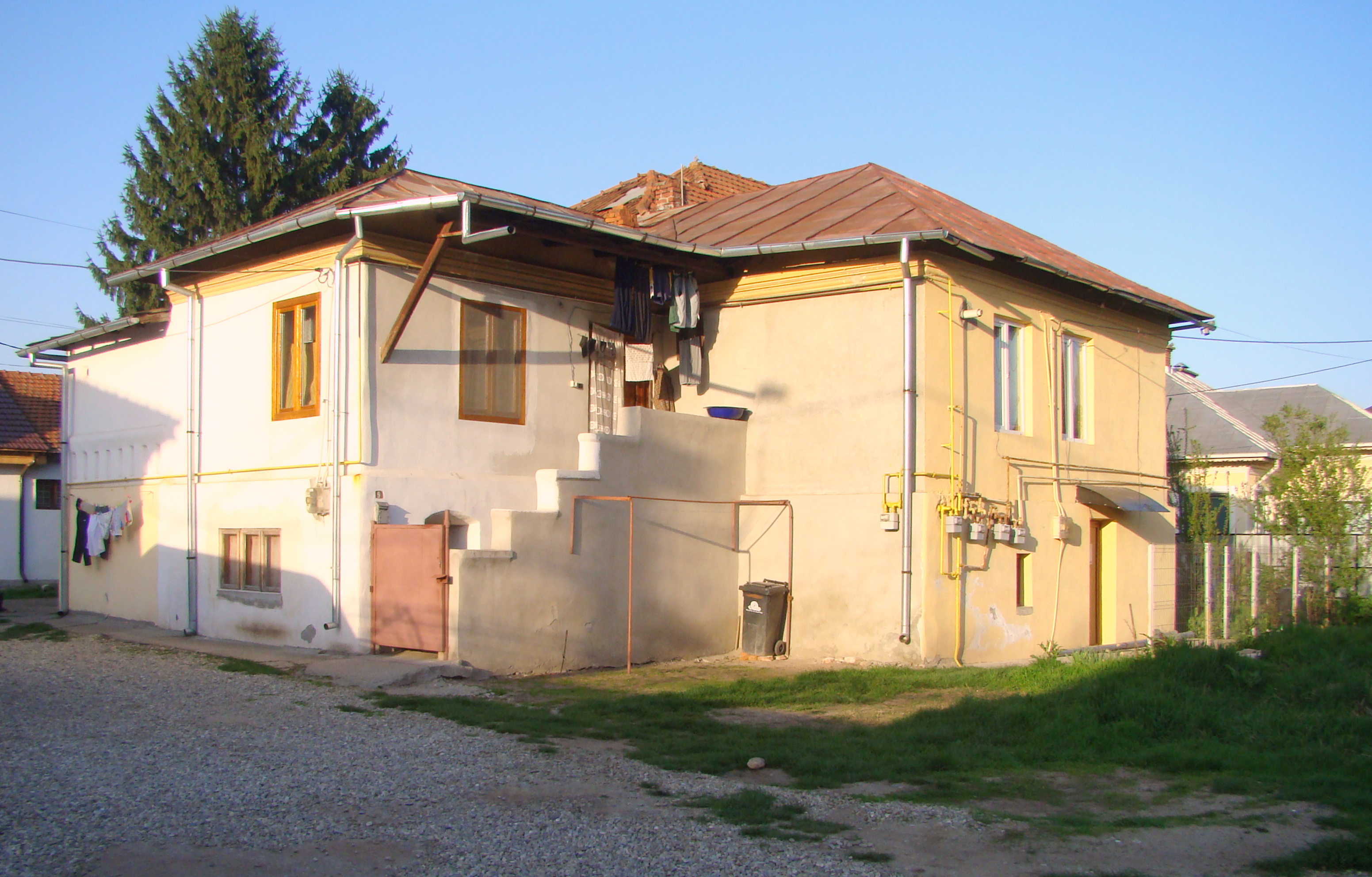 Casa protopopului Andrei Schevofilax, municipiul Târgu Jiu, str. 16 Februarie nr 9